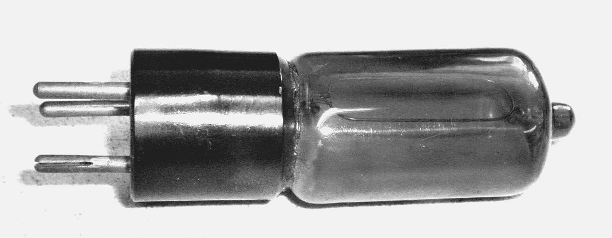 Fotozelle (Fa. Pressler, ca. 1935), Länge ca. 90mm; die Anode ist der Drahtbügel, die Foto-Kathode wird durch den rückseitig innen mit Metall (Silber) beschichteten Glaskolben gebildet.